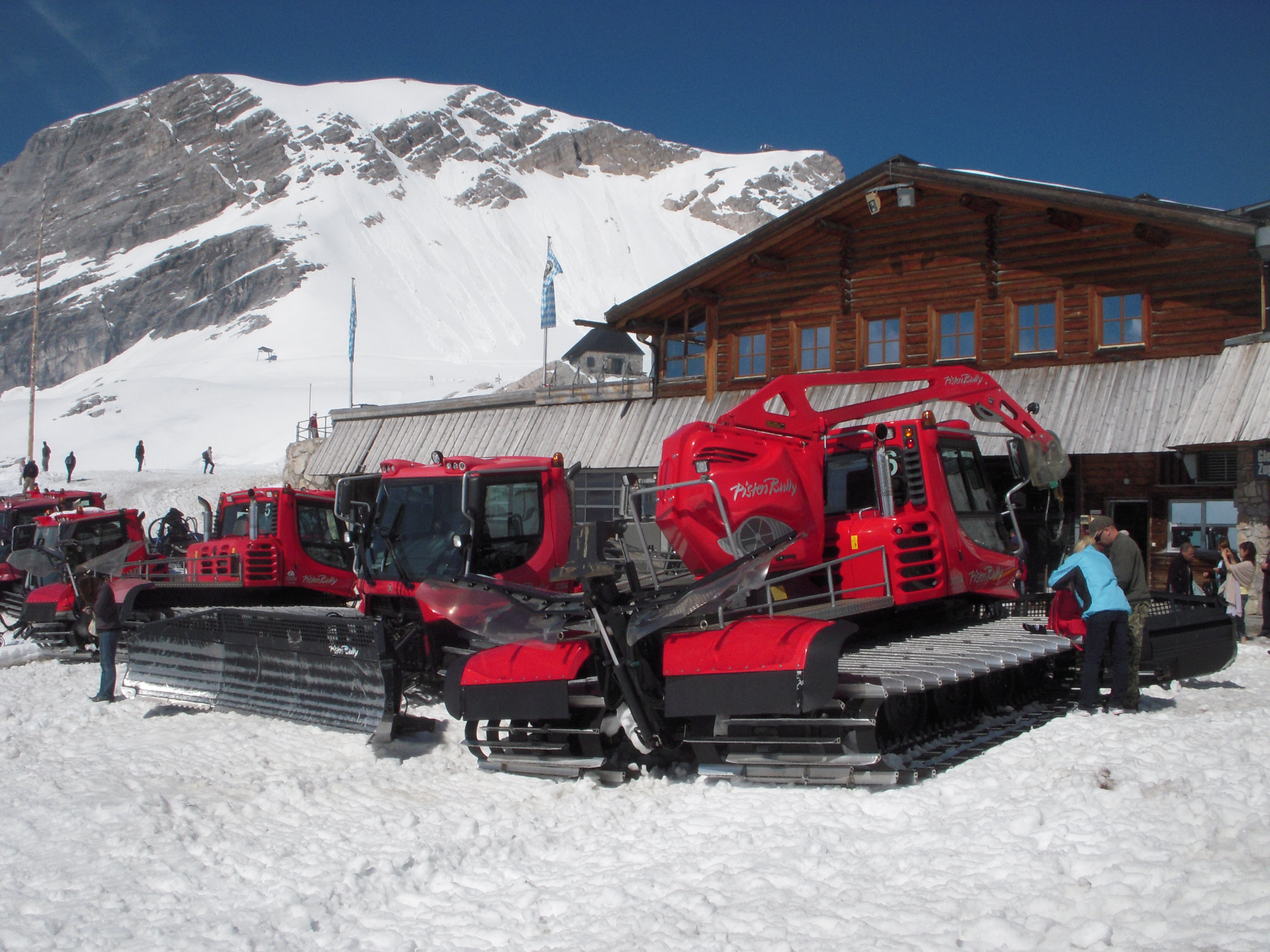 Snerydningsmaskiner ved Zugspitzplatt, der er endestation for tandhjulsbanen Bayerische Zugspitzbahn og svævebanen Zugspitz-Gletscherbahn i Bayern, Tyskland. Juni 2010.